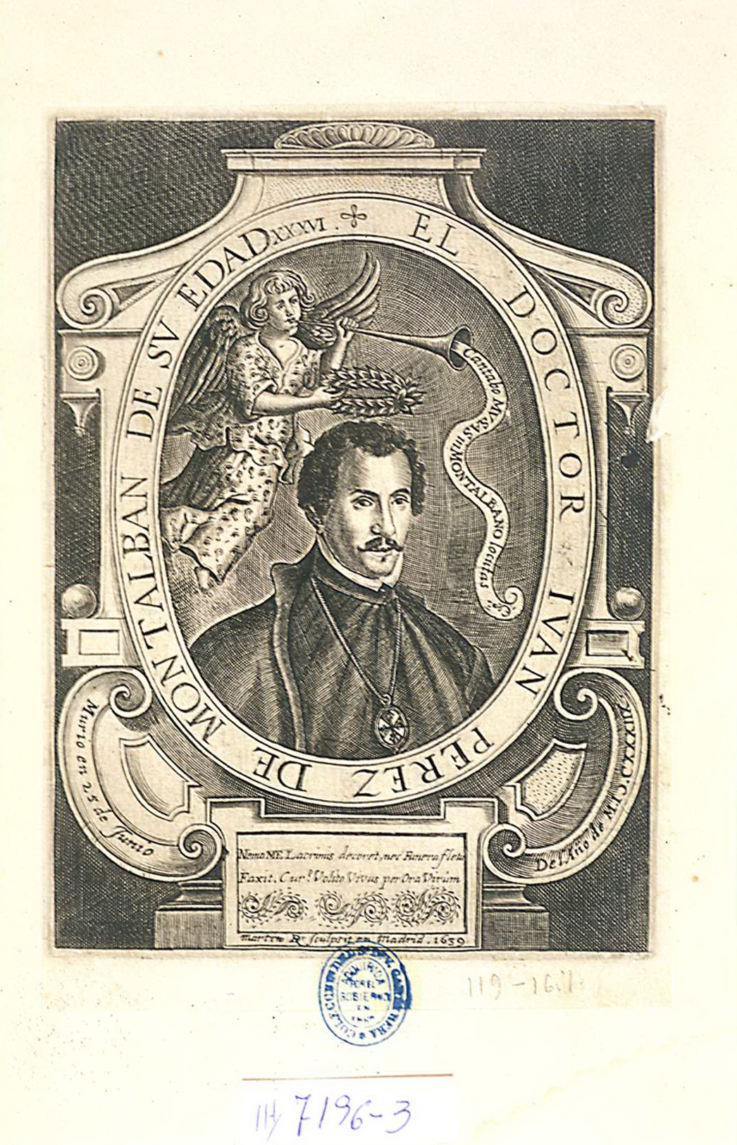 Estampa calcográfica procedente de Lágrimas panegíricas a la muerte del gran poeta Juan Pérez de Montalbán, Madrid, 1639